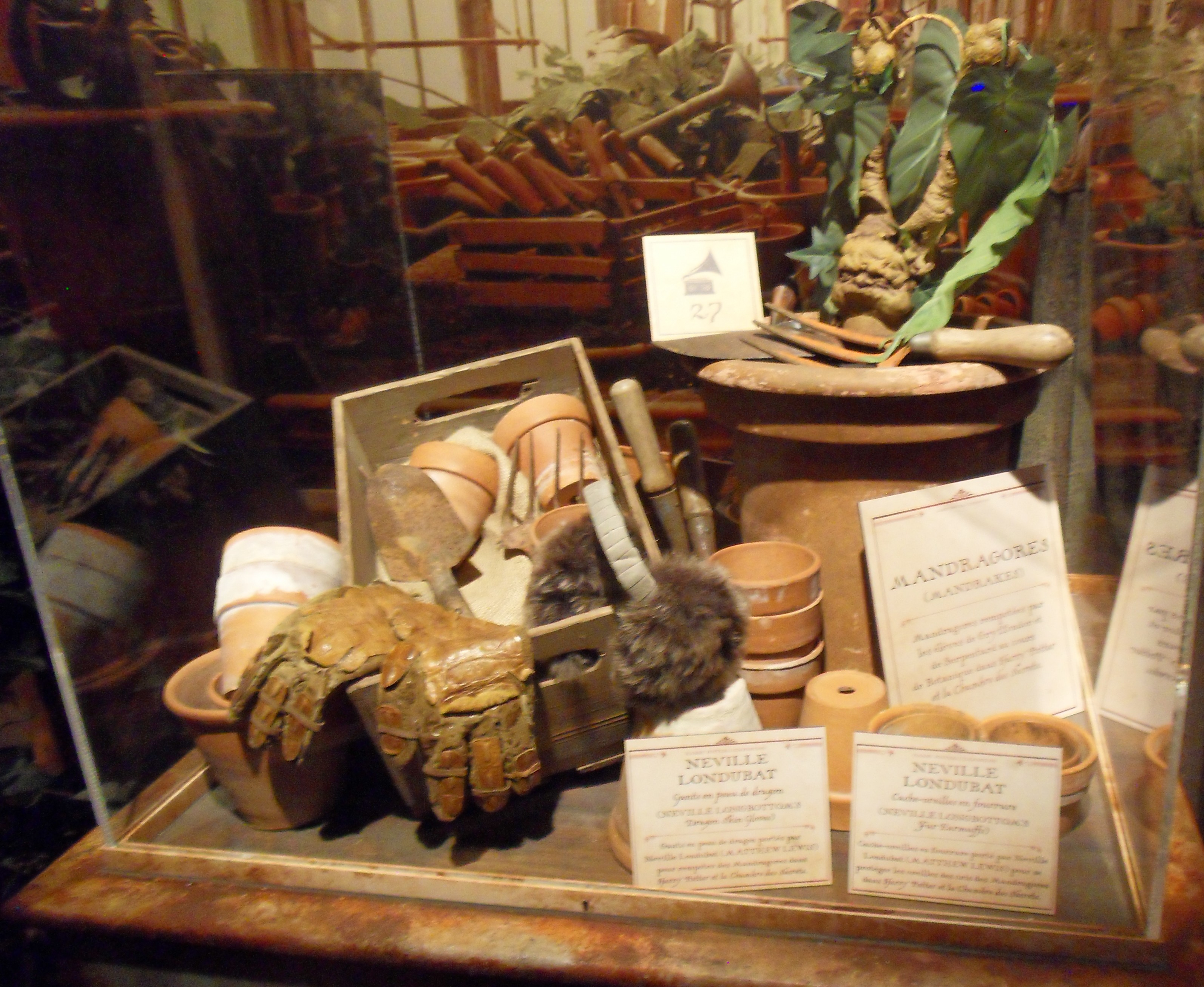 Equipements du cours de botanique, Harry Potter Exhibition, Cité du Cinéma, Saint Denis (Paris) avril 2015